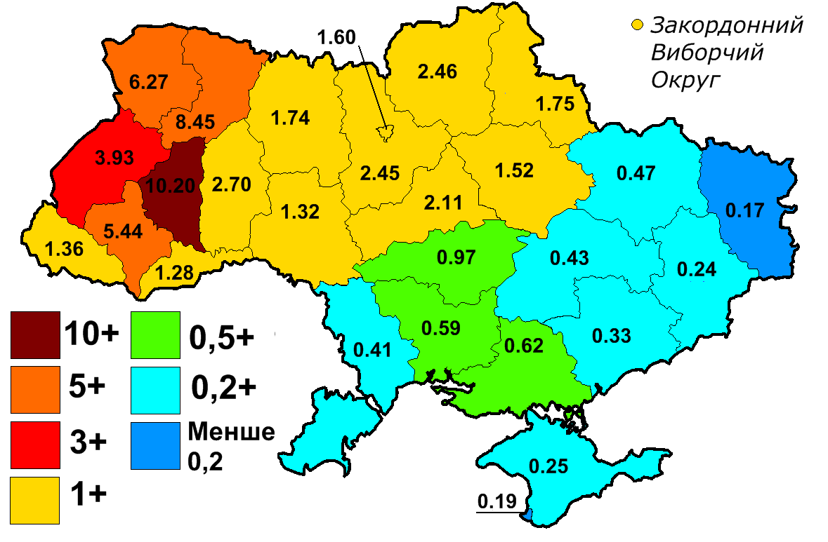 Результат Блоку Костенка і Плюща на виборах 2006 року за регіонами.